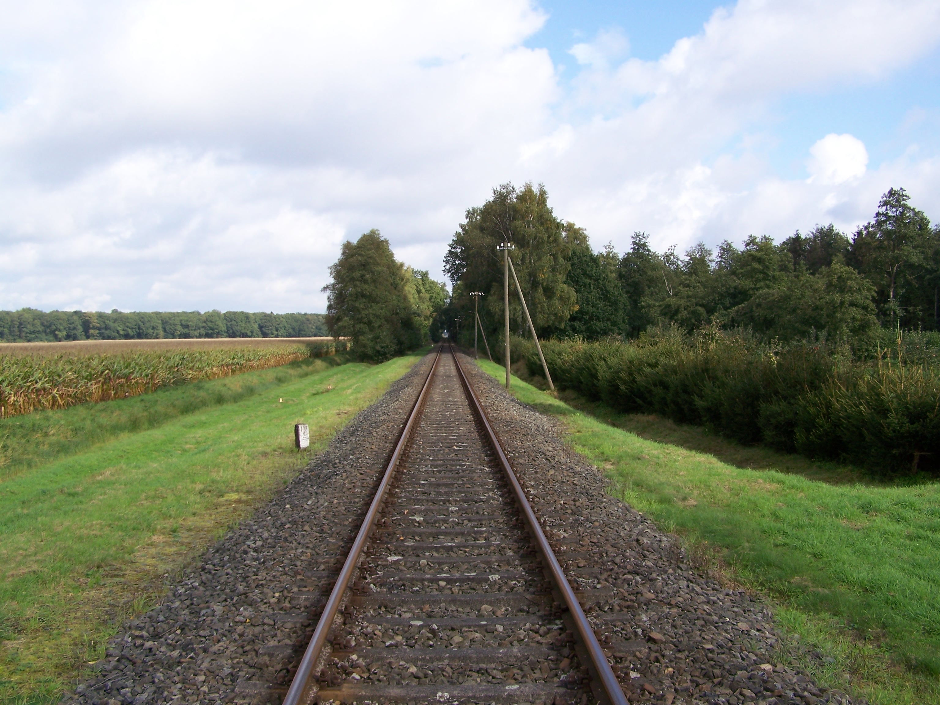 Kurz nach der DEK Brücke Blickrichtung Freren.